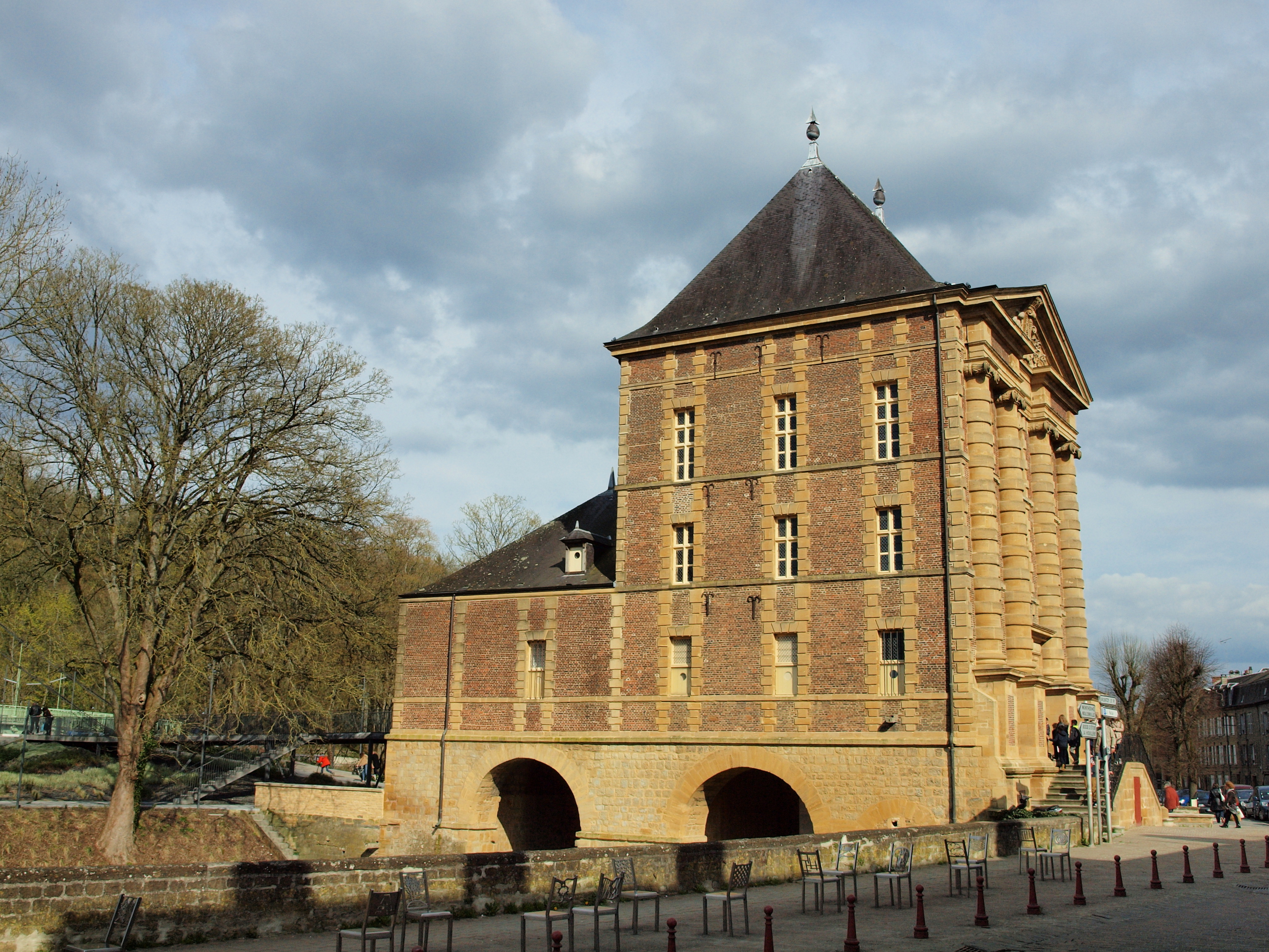 Charleville-Mézières (Ardennes, France) ; le Vieux Moulin, qui abrite le Musée Arthur Rimbaud, en avril 2016.